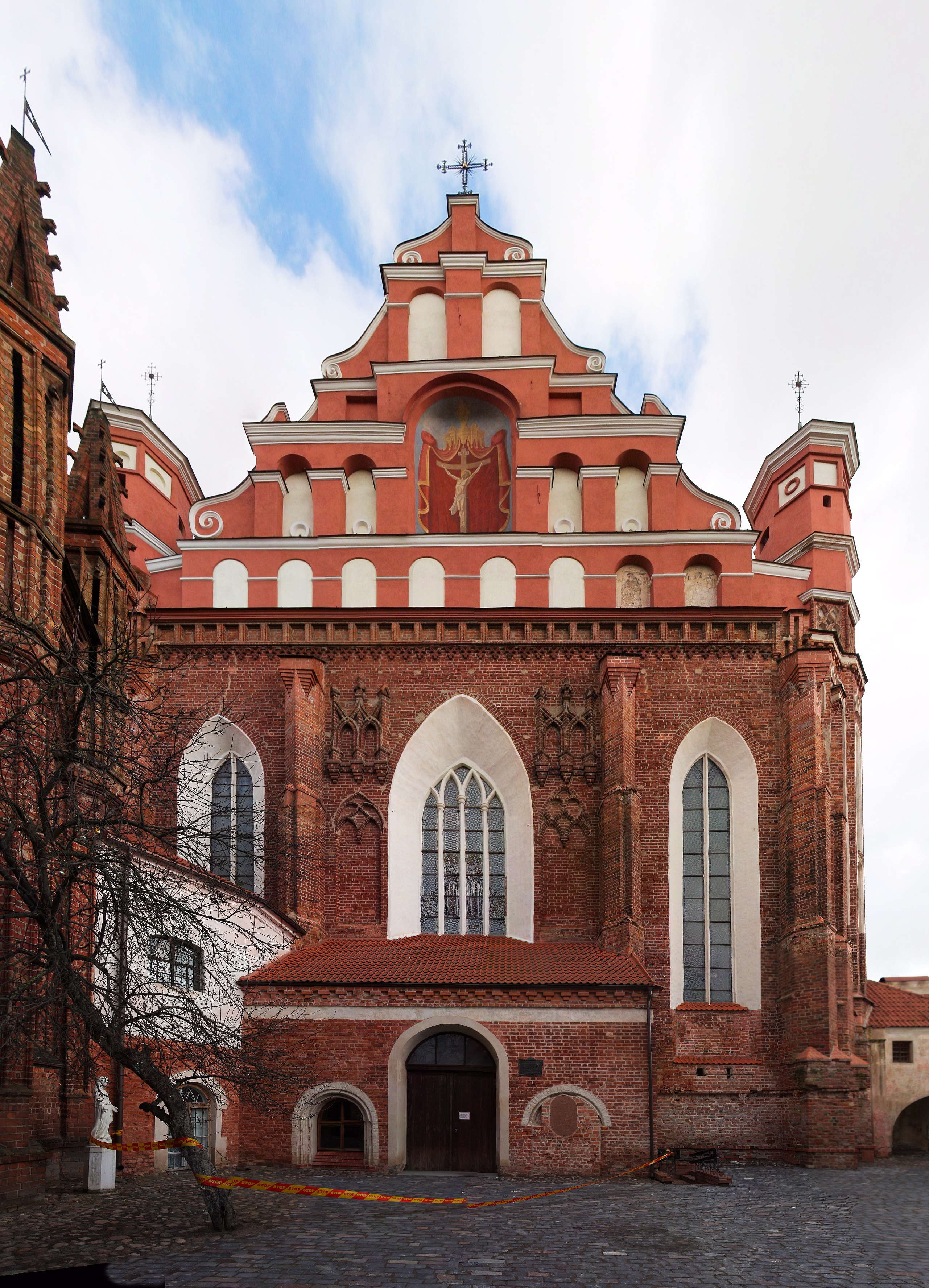 Bernardine Church in Vilnius